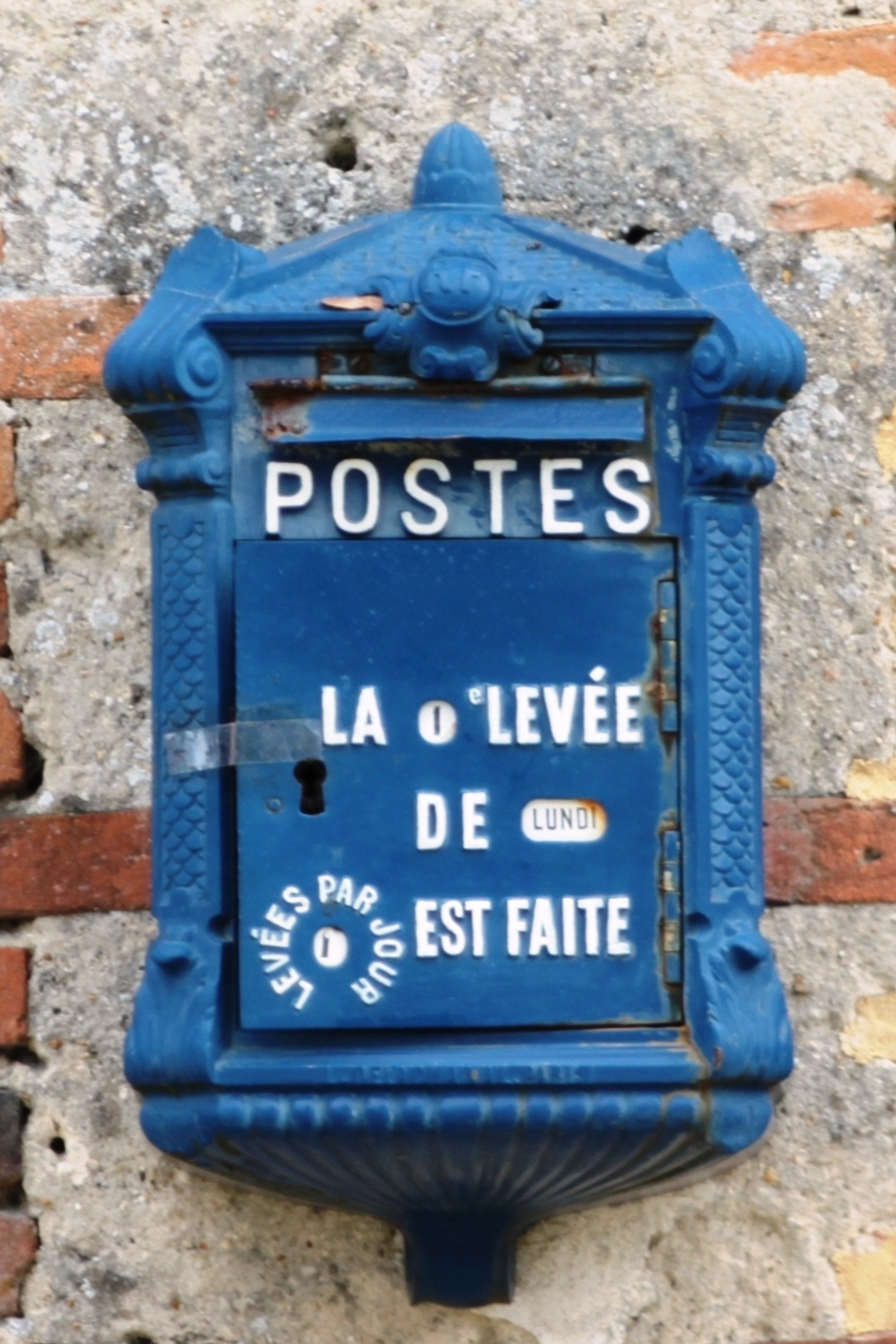 Ancienne boîte aux lettres française murale, fonte, peinte de couleur "bleu des postes" avec inscriptions en lettres blanches, fabrication Delachanal, modèle dit "Moucheotte type I, mis en service à partir de 1900, au Musée Alain Fournier à La Chapelle-d'Angillon, Cher, Centre-Val de Loire, France.